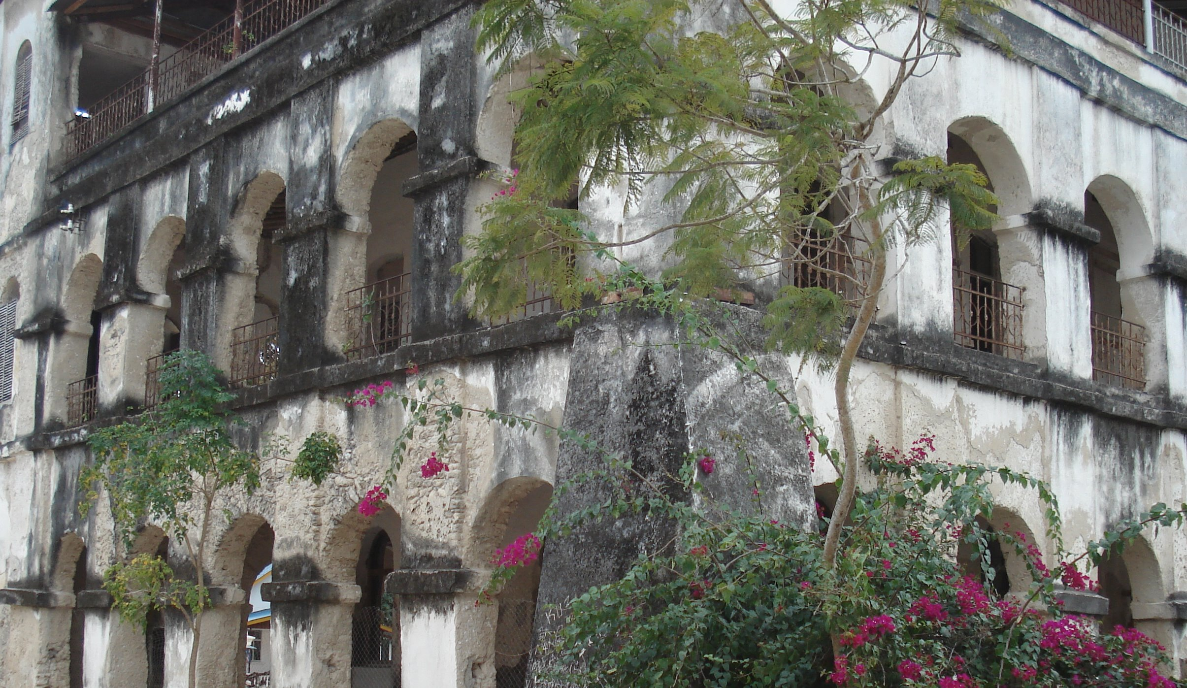 Mission building in Bagamoyo Tanzania